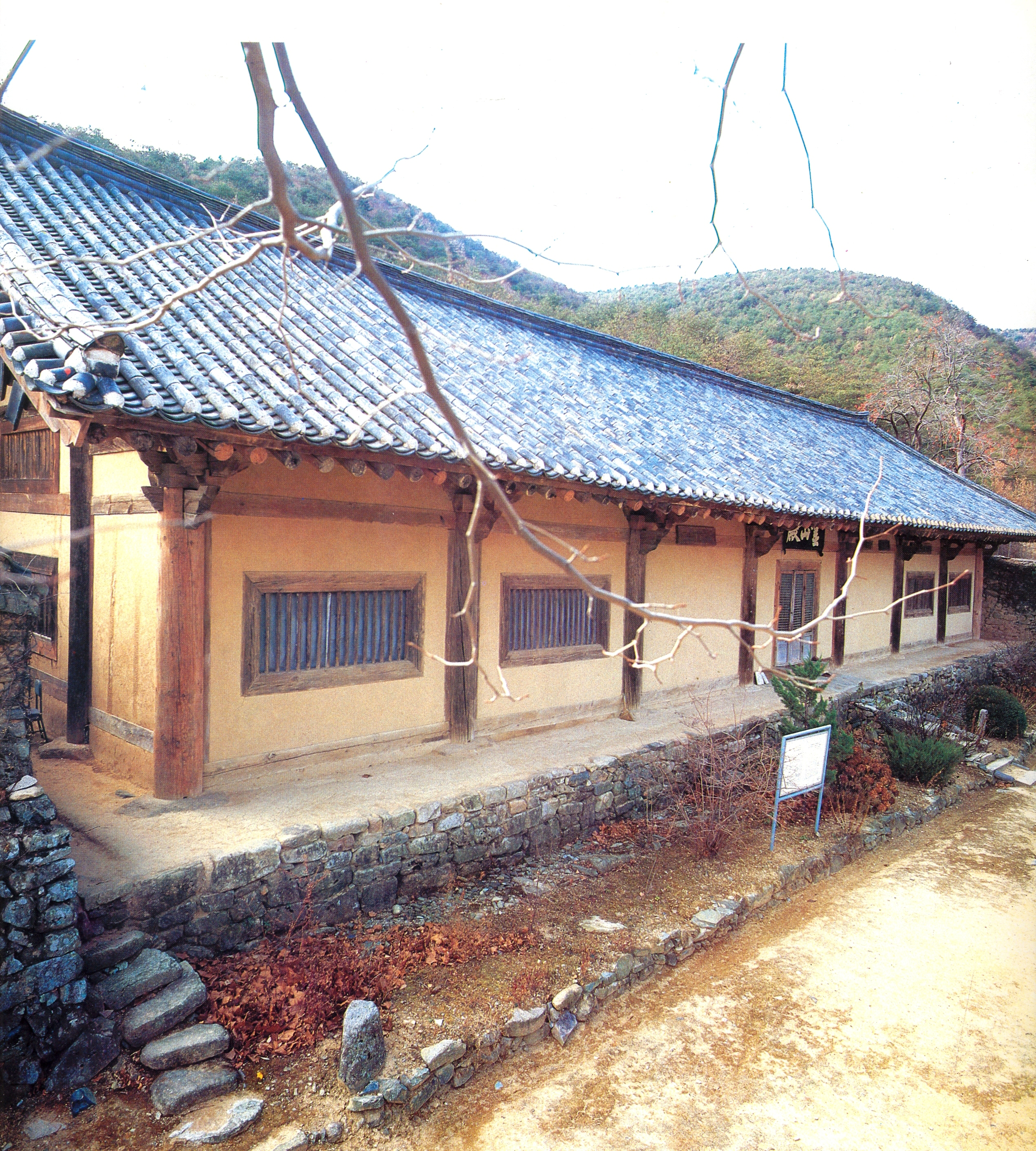 영천 은해사 거조암 영산전 文言: 永川 銀海寺 居祖庵 靈山殿